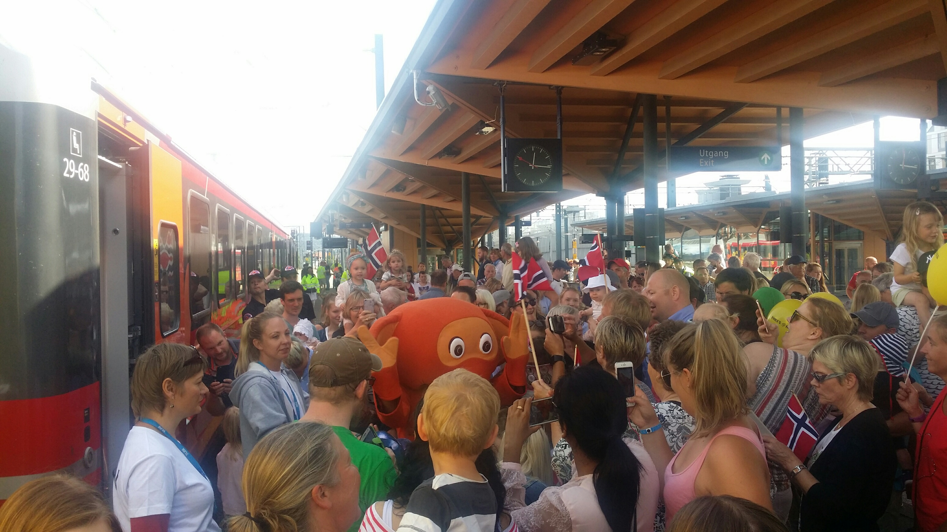 Lillestrøm 25. juli 2017